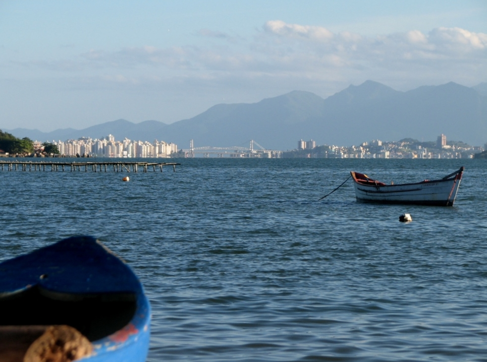 A Baía Norte com o Centro, na Ilha de Santa Catarina, e o Estreito, na parte continental de Florianópolis, vistos da ilha, conectados pelas três pontes - Hercílio Luz, Pedro Ivo Campos e Colombo Salles. Ao fundo, as montanhas do Parque Estadual da Serra do Tabuleiro.